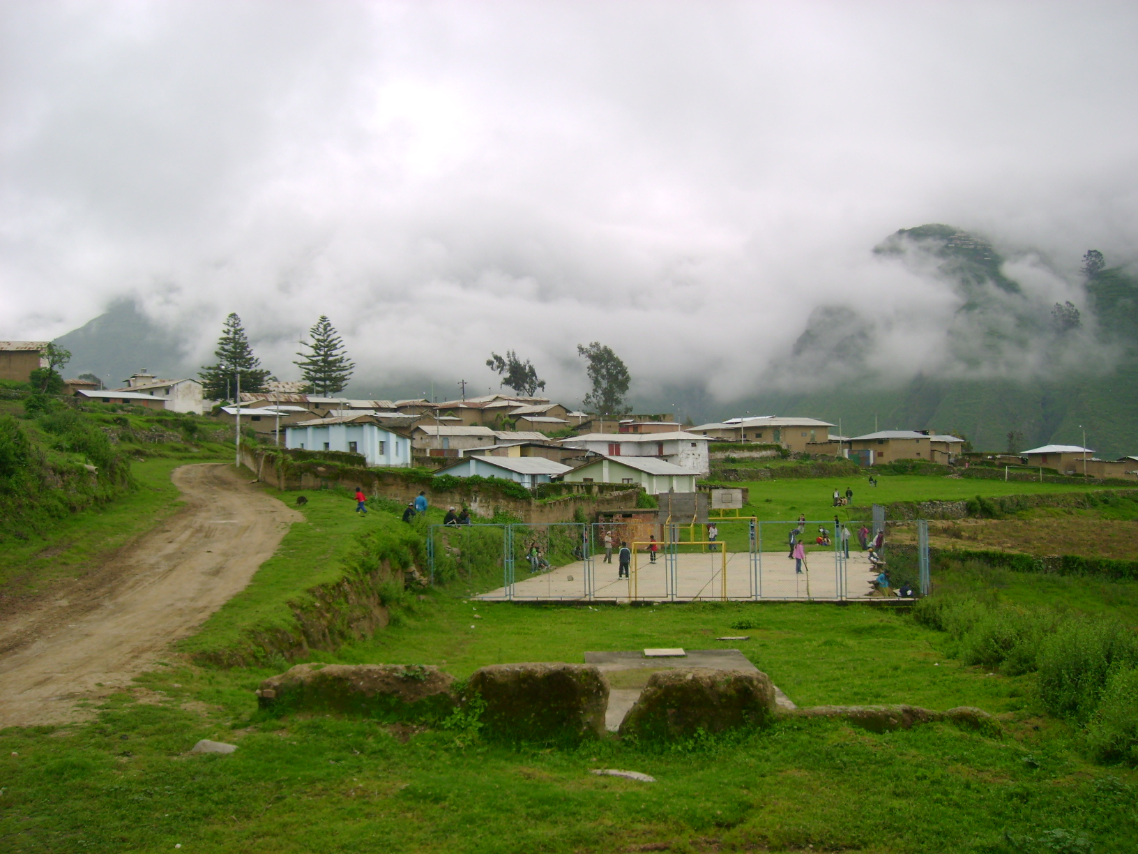 Paisaje de caujul